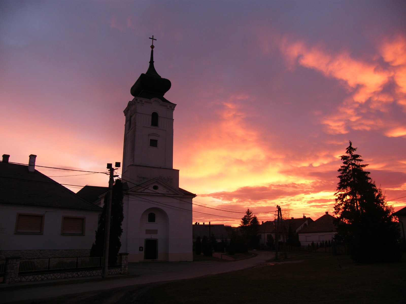 Szent István király római katolikus templom (Écs, Kis u. 9.)